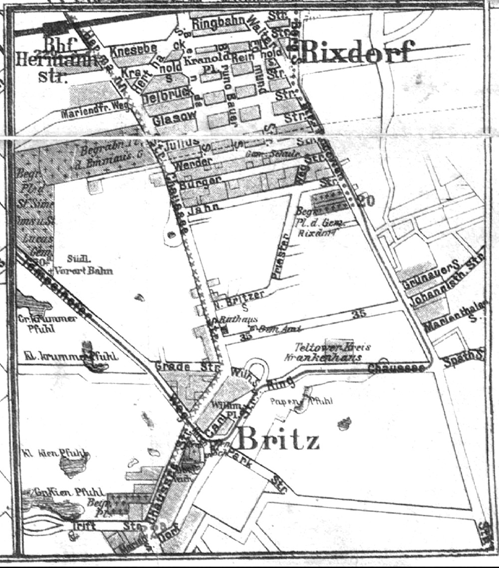 Straßensituation des Berliner Vorortes Britz mit Stand des Jahres 1900